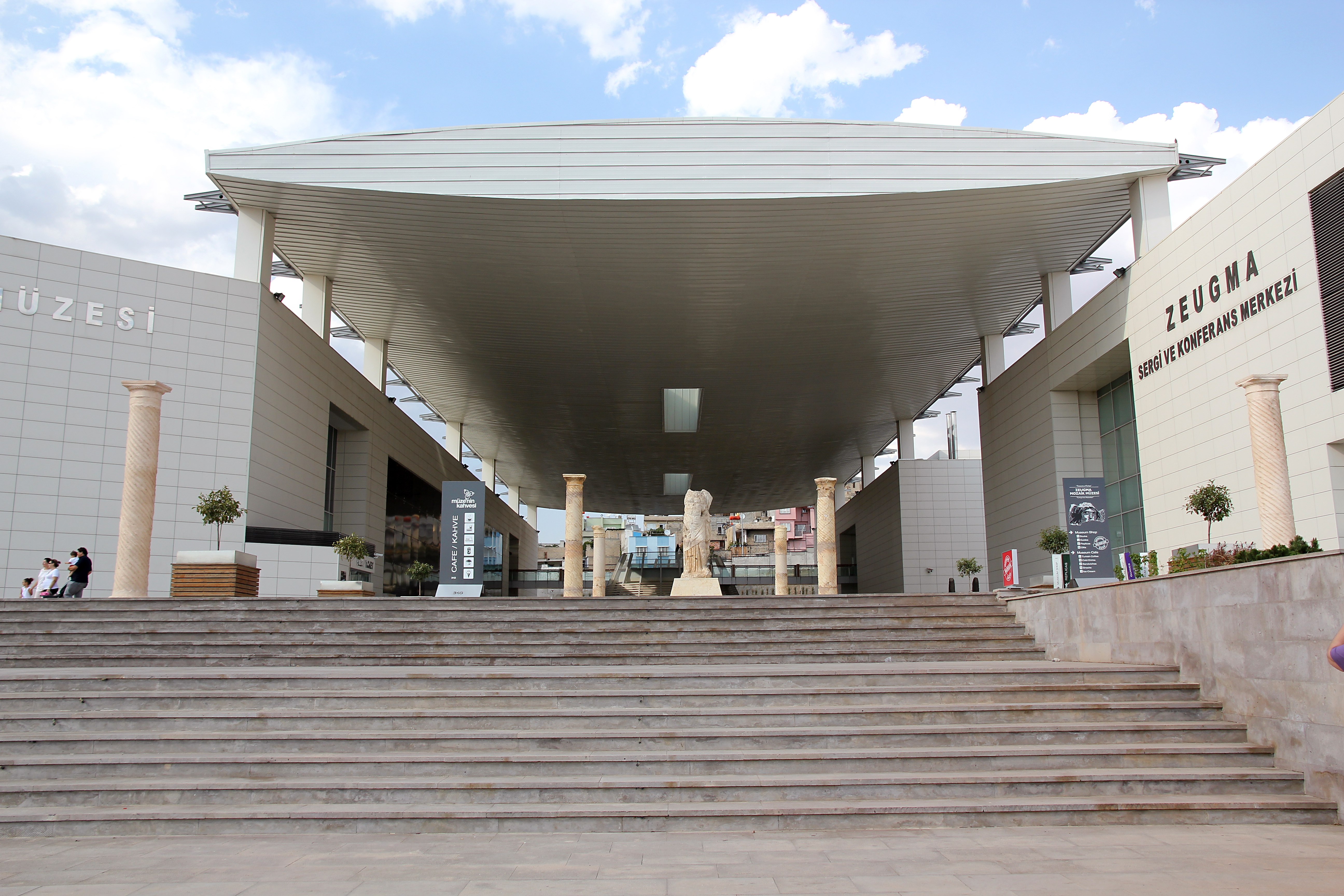 Zeugma-Mosaik-Museum, Gaziantep, Türkei, Eingang